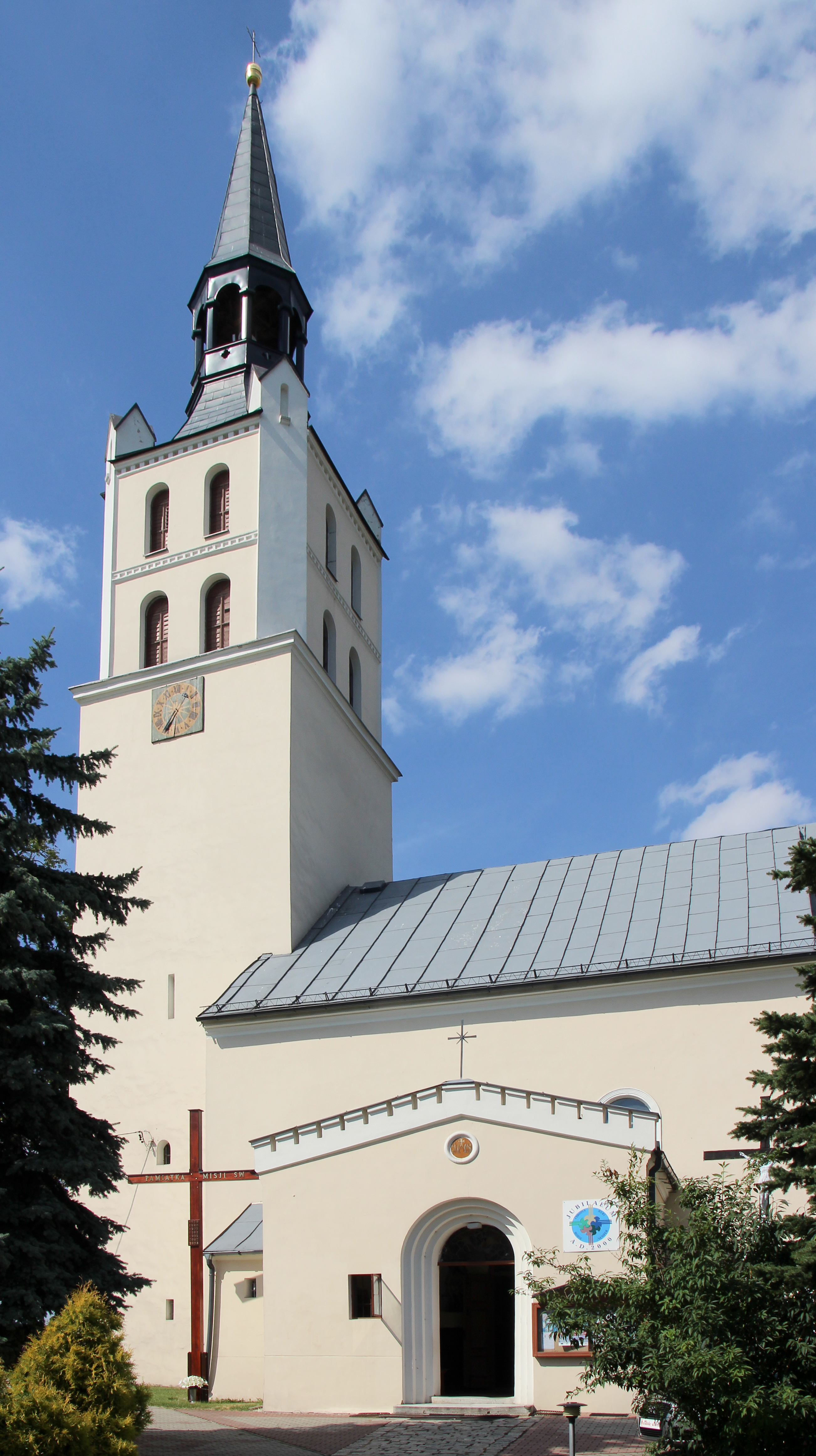 Szybowice – rzymskokatolicki kościół parafialny p.w. św. Michała Archanioła, XVI, 1651, 1827